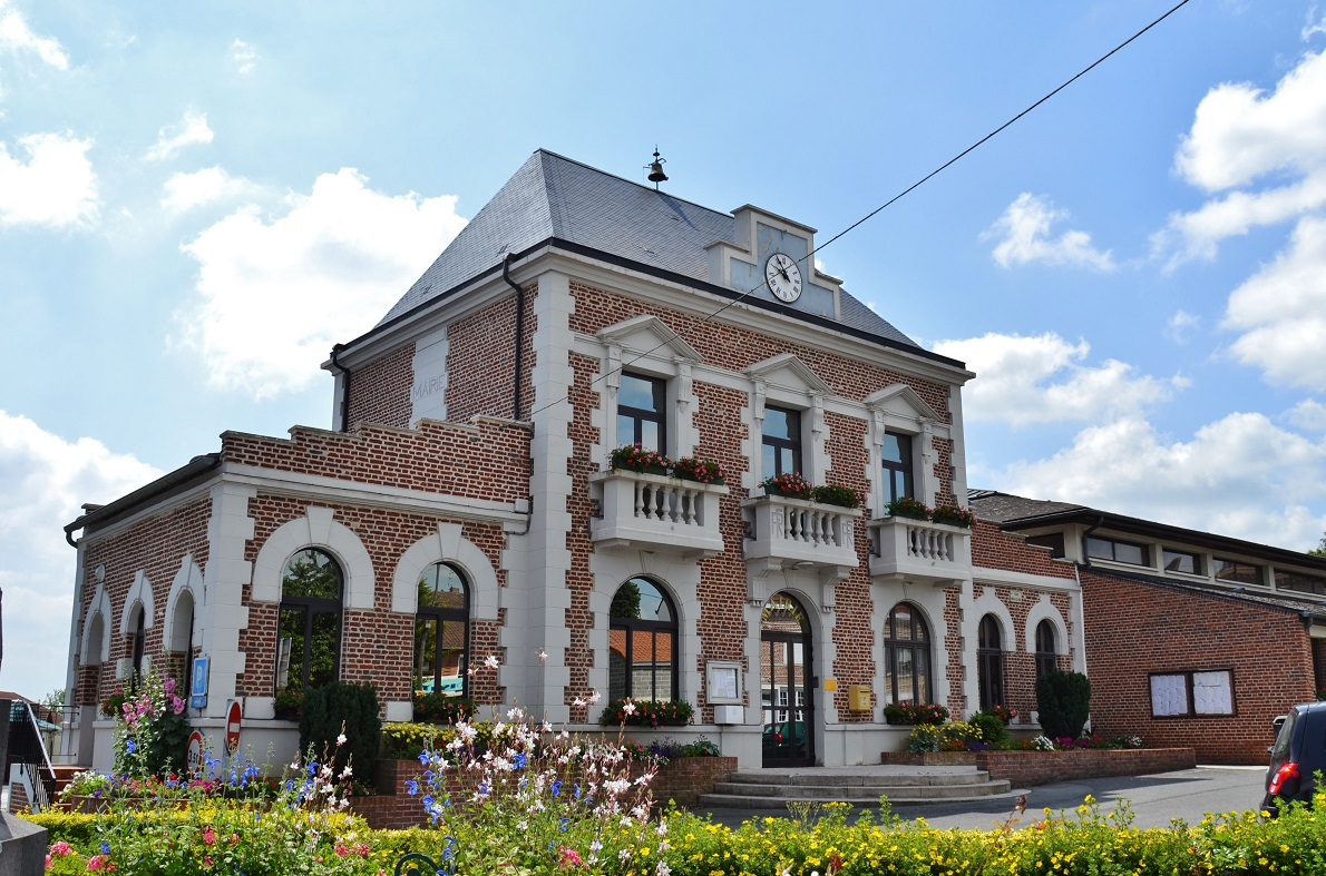 La Mairie